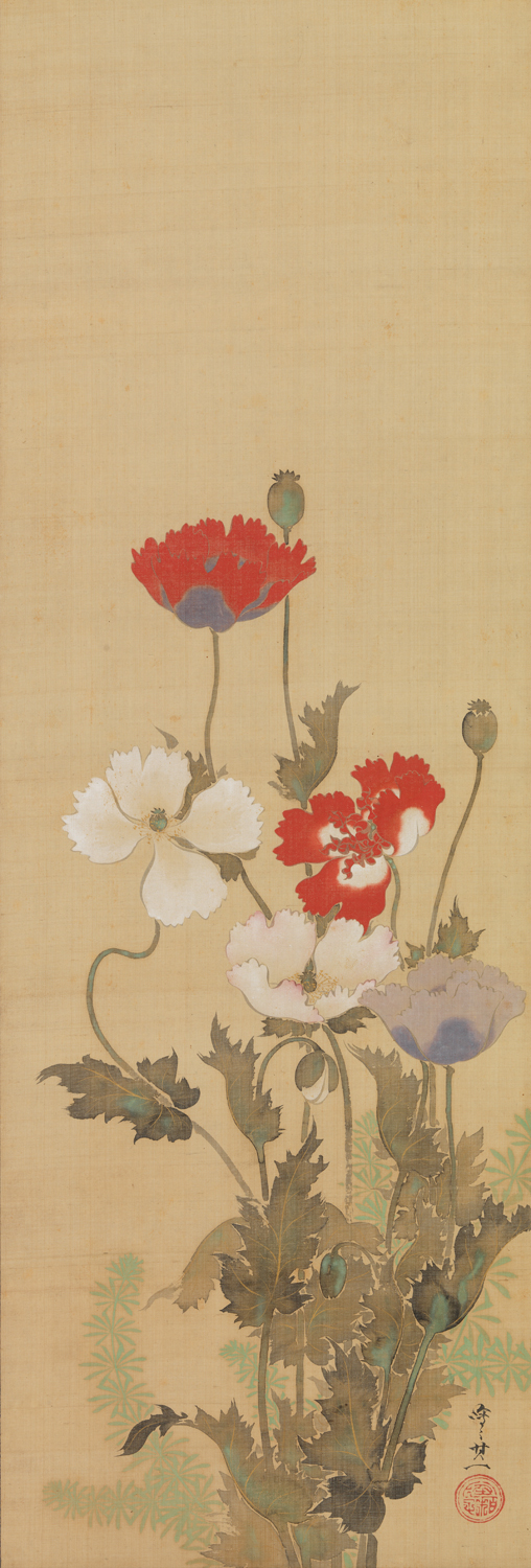 Japan; Hanging scroll; Paintings